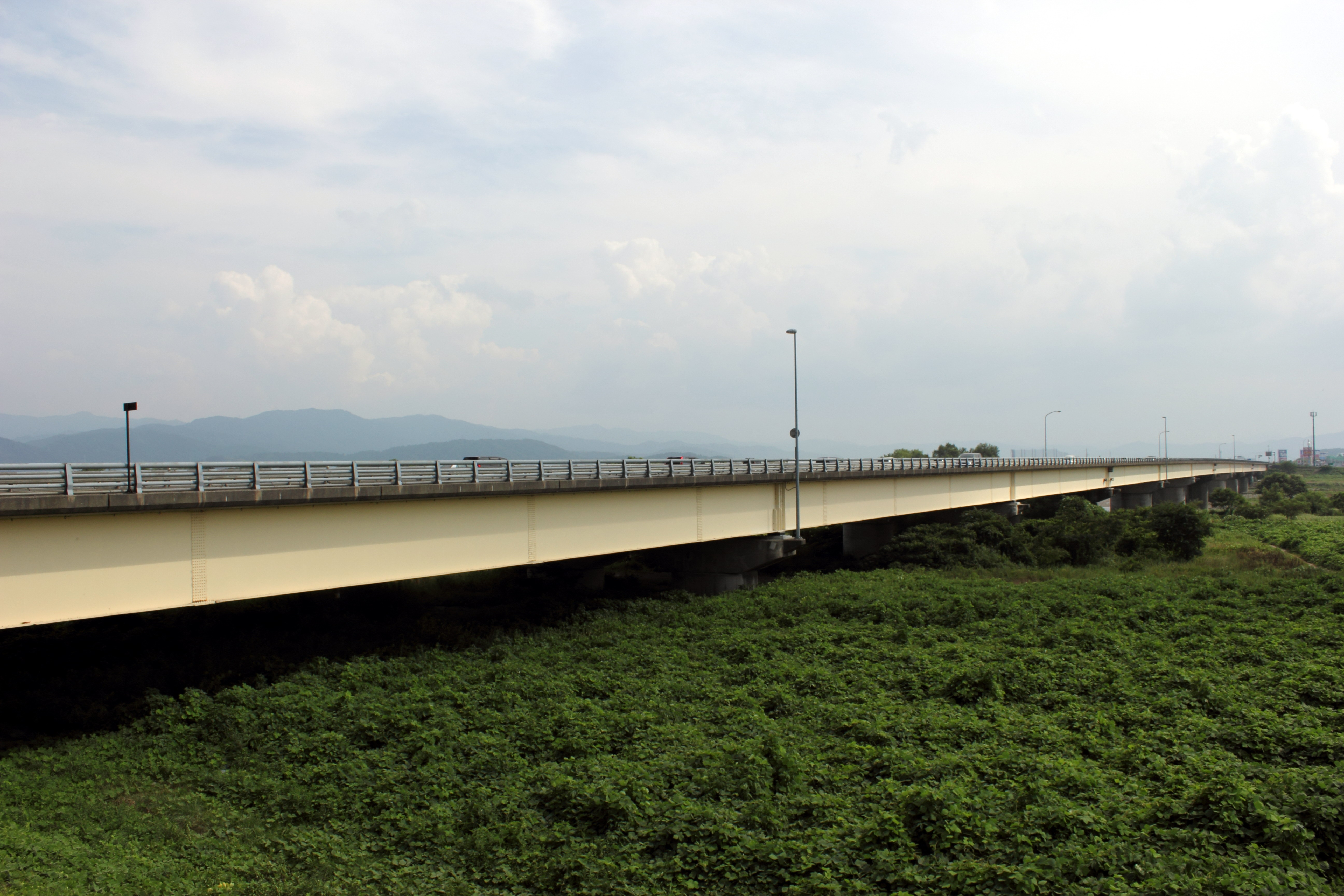 九頭竜川にかかる福井大橋